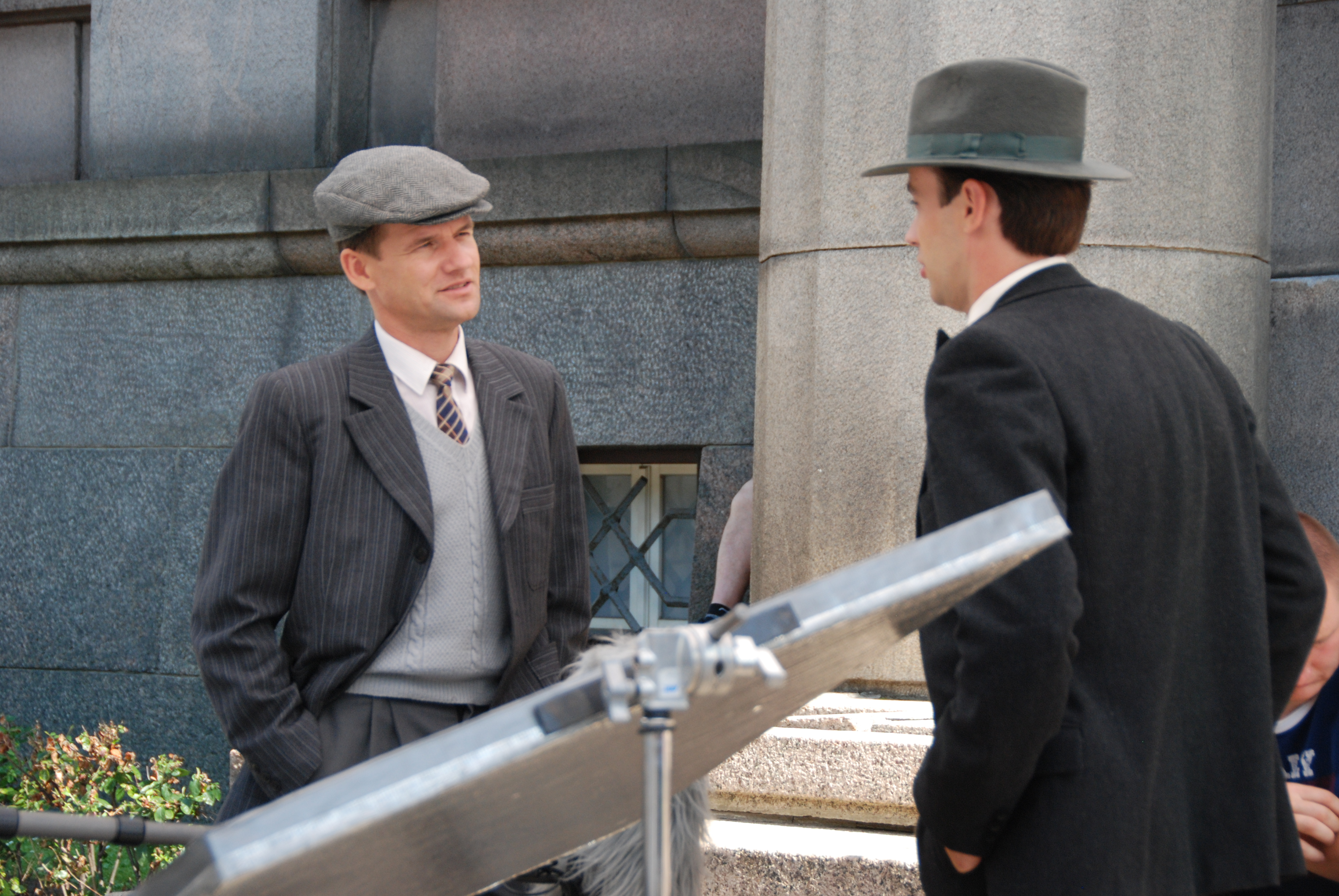 Filmas "Sapņu komanda 1935" epizodes filmēšana pie Ministru kabineta ēkas